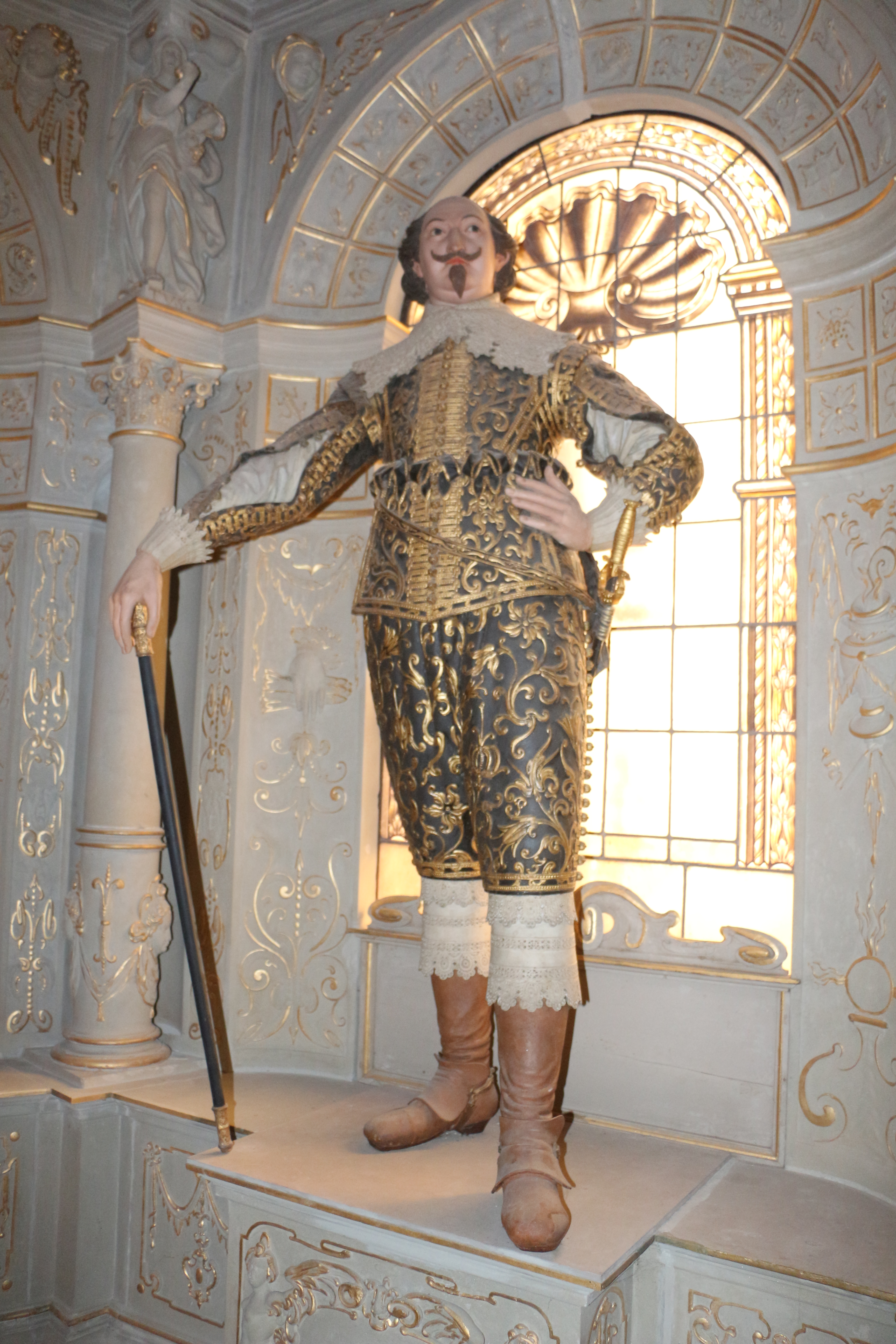 Statur von Herzog Adolf Friedrich I. von Mecklenburg im Grabmal im Münster von Bad Doberan